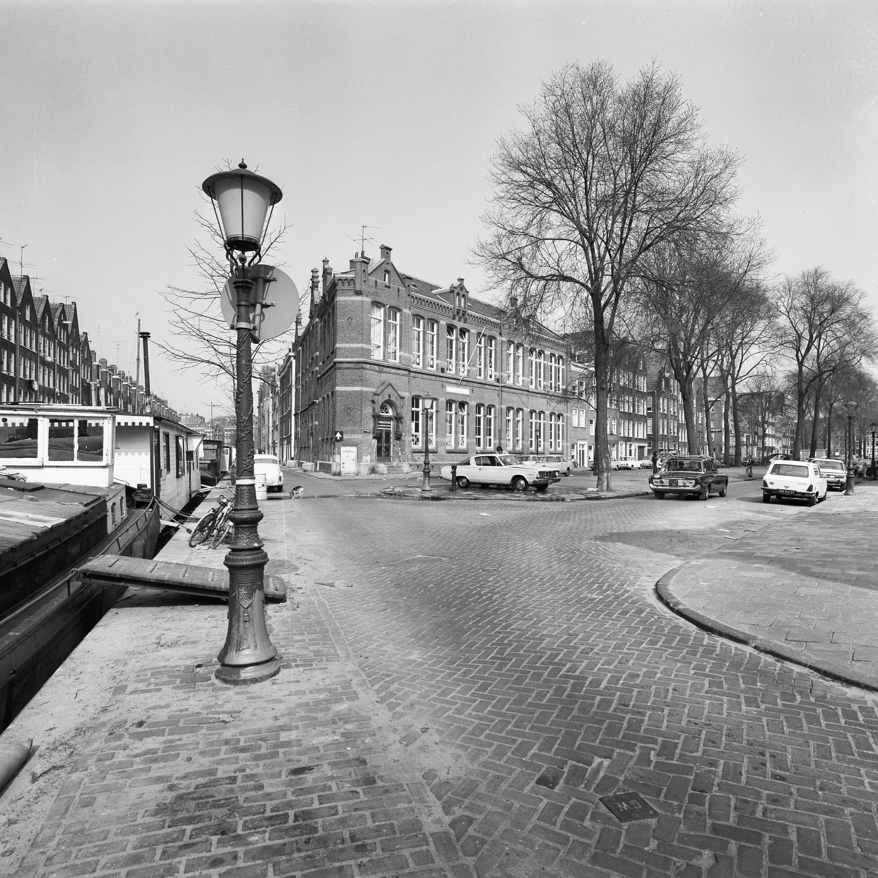 voorgevels